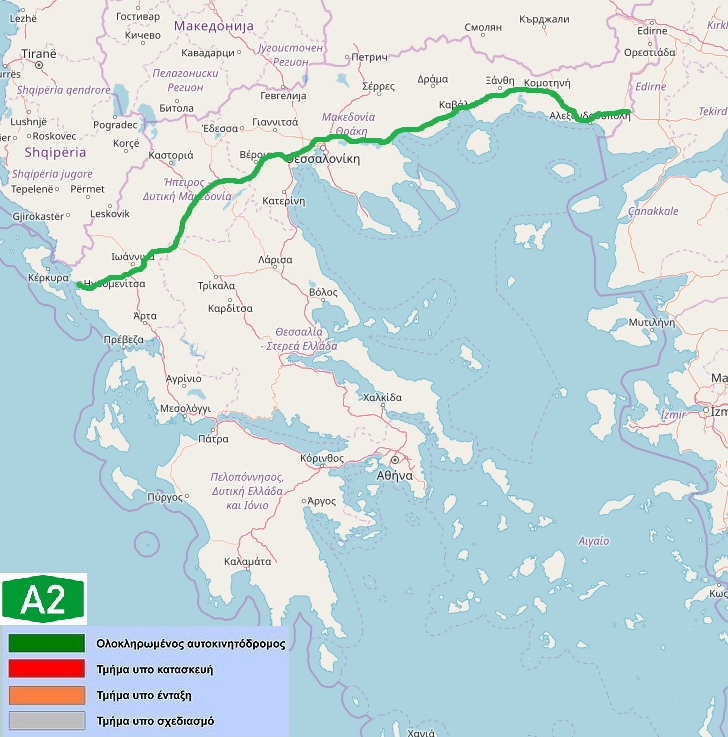 Ο χάρτης του Α2 το 2018 This map may be incomplete, and may contain errors. Don't rely solely on it for navigation.